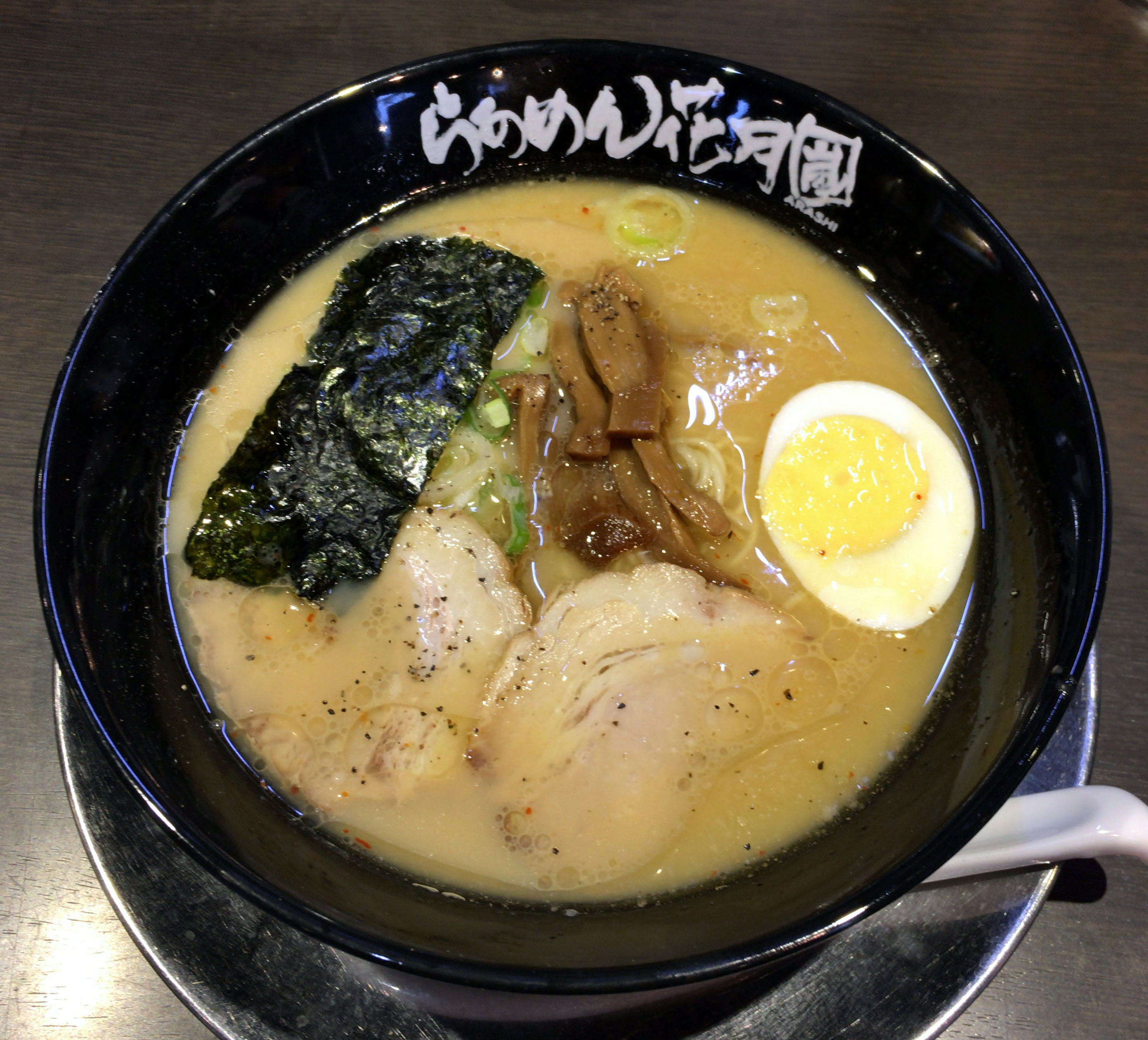 らあめん花月嵐の嵐げんこつらあめん（味噌）